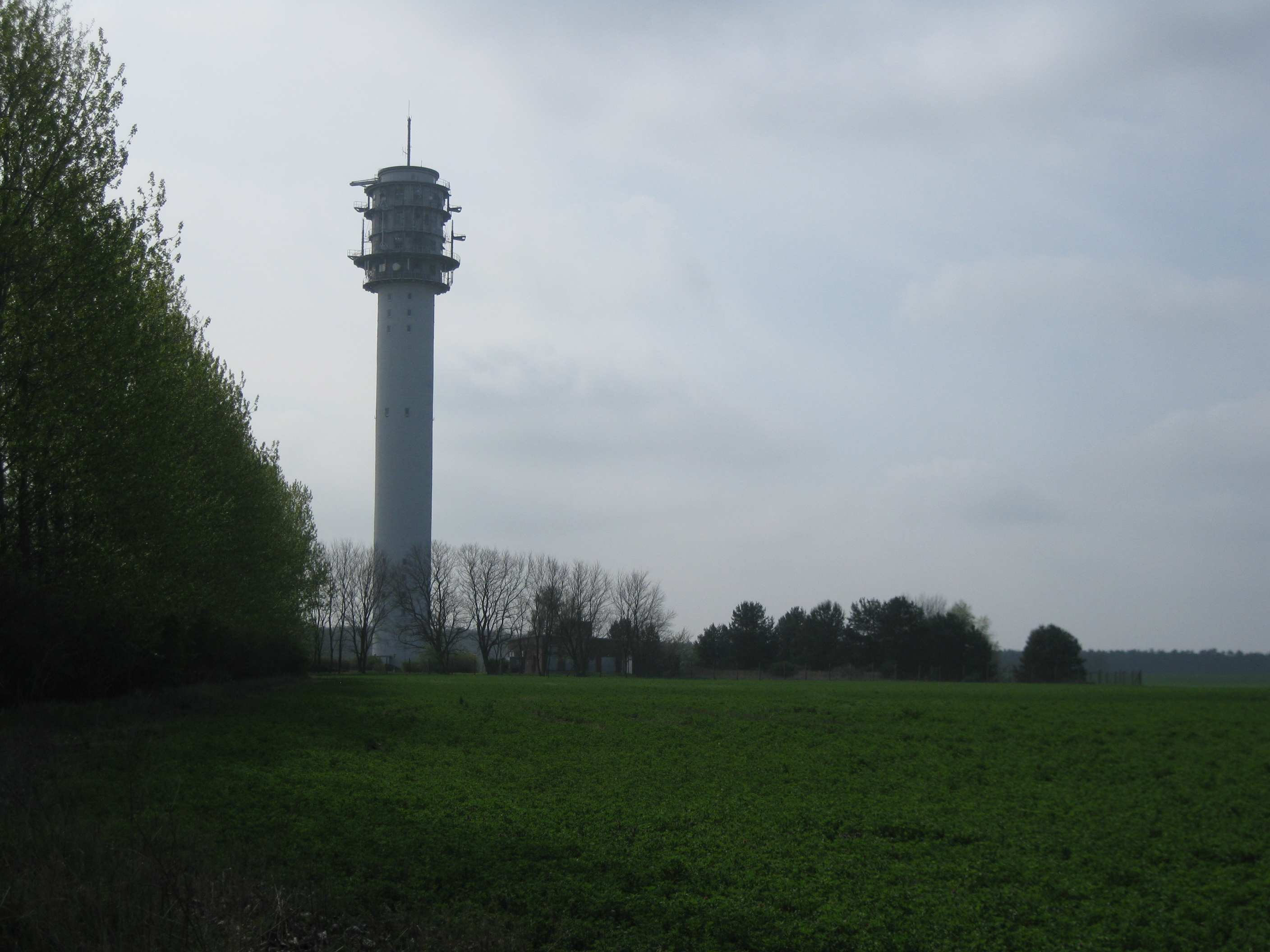 telecommunication tower in Petkus